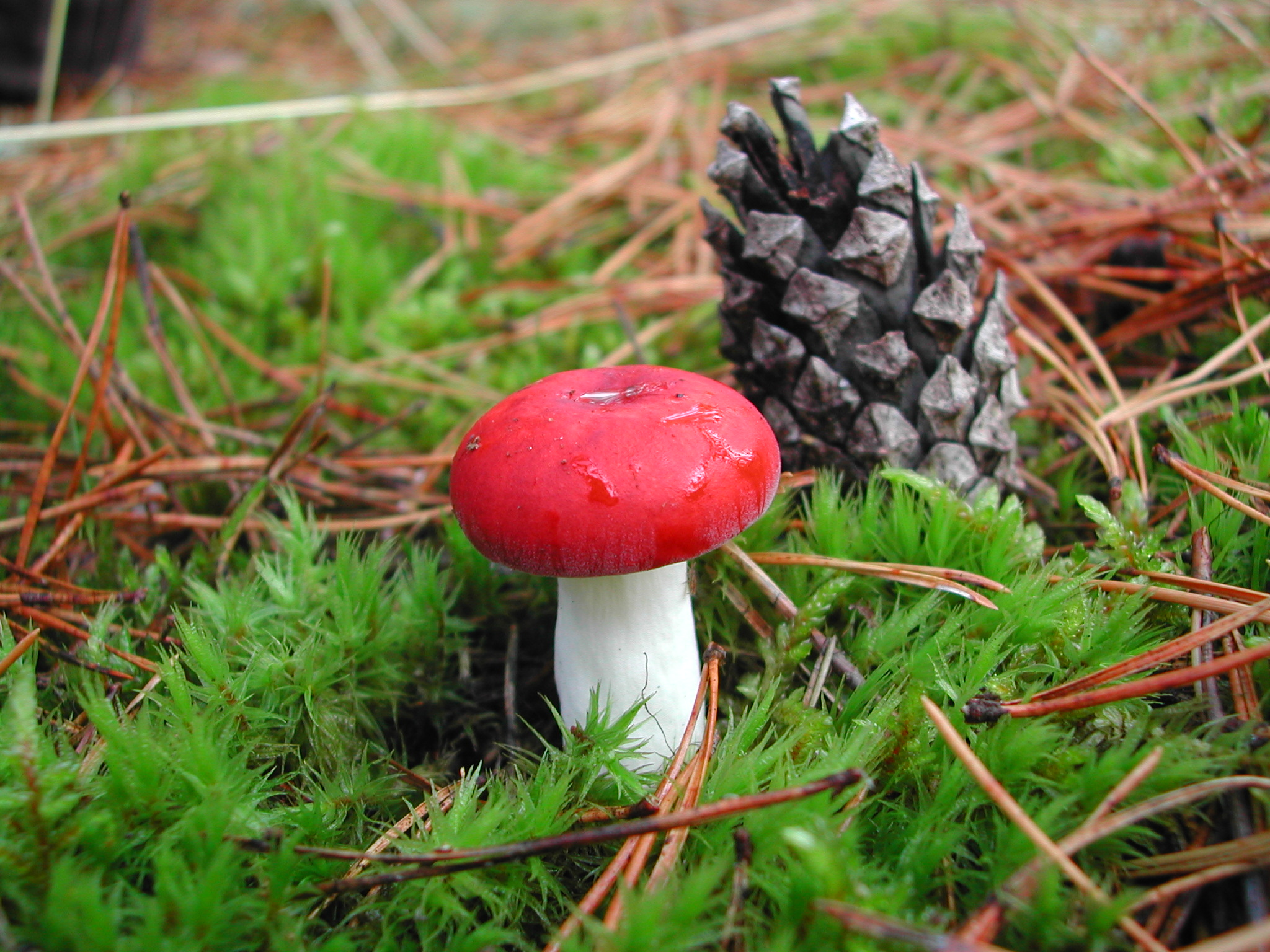 Russula emetica. Photo taken in Wdzydze Kiszewskie, Poland.